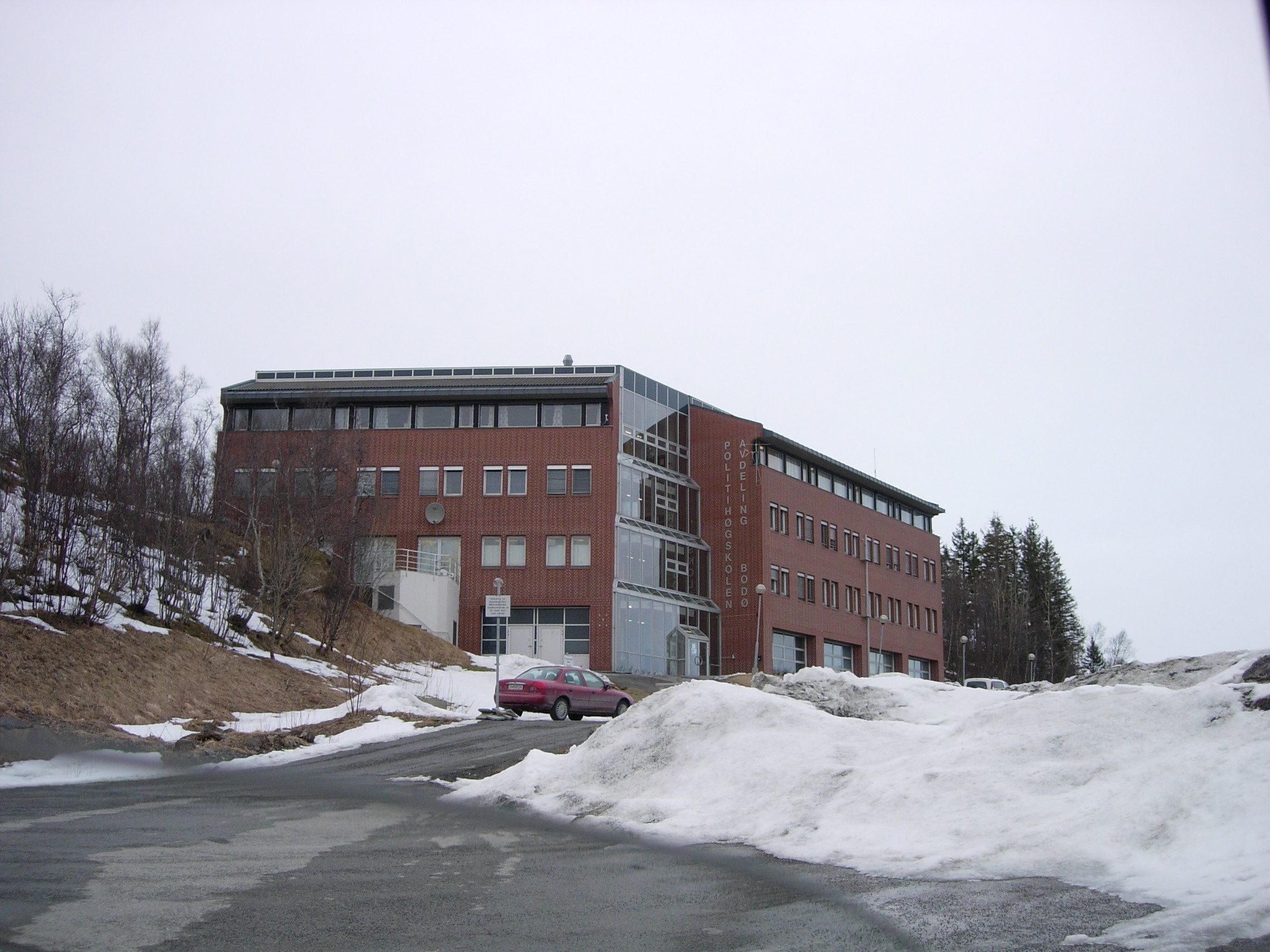 Police accademy in Bodø / Politihøgskolen i Bodø